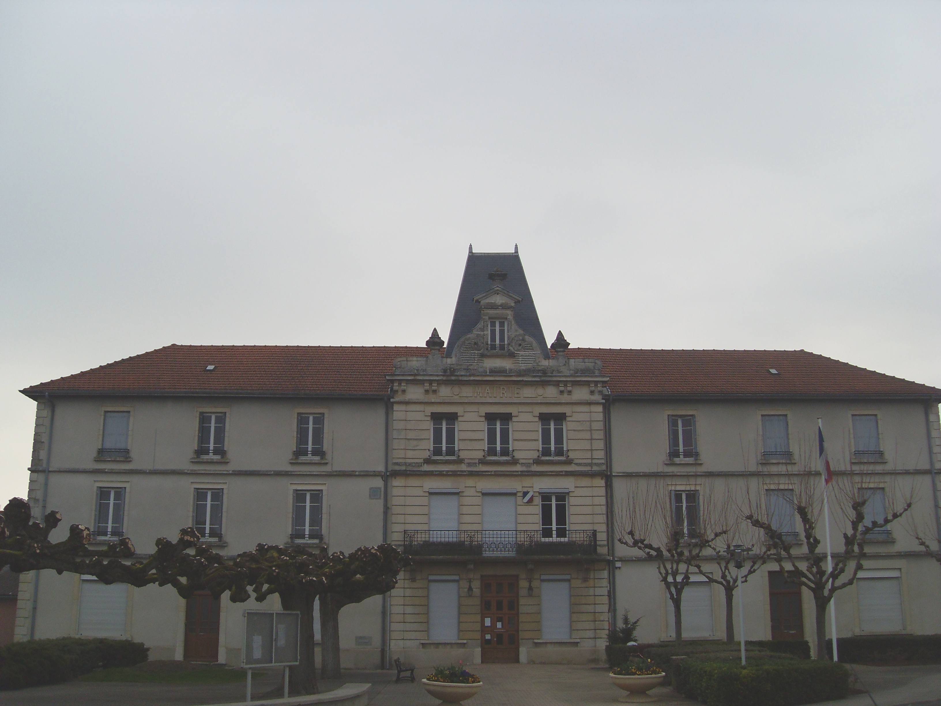 Mairie de Nivolas-Vermelle, Isère, France